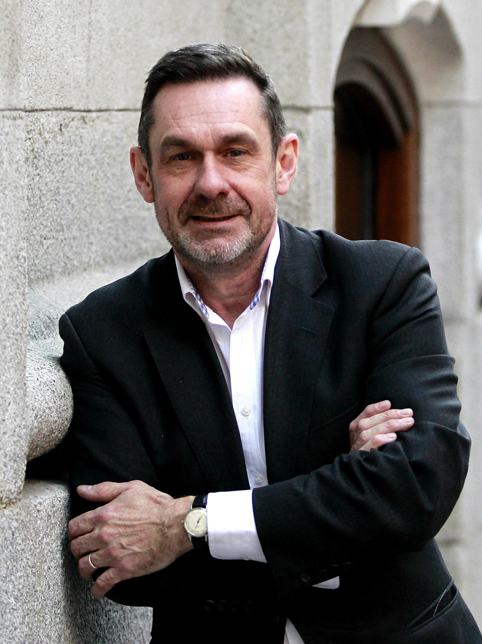 Paul Mason, una de las figuras más revelantes del periodismo progresista a nivel mundial, explica los entresijos de su último libro 'Postcapitalismo'. "La izquierda tiene que decidir lo que piensa sobre el sector colaborativo, el sector postcapitalista emergente". "Manuela Carmena en lugar de no usar su poder, tiene un poder inmenso para escuchar la respuesta y empezar a hacerlo"